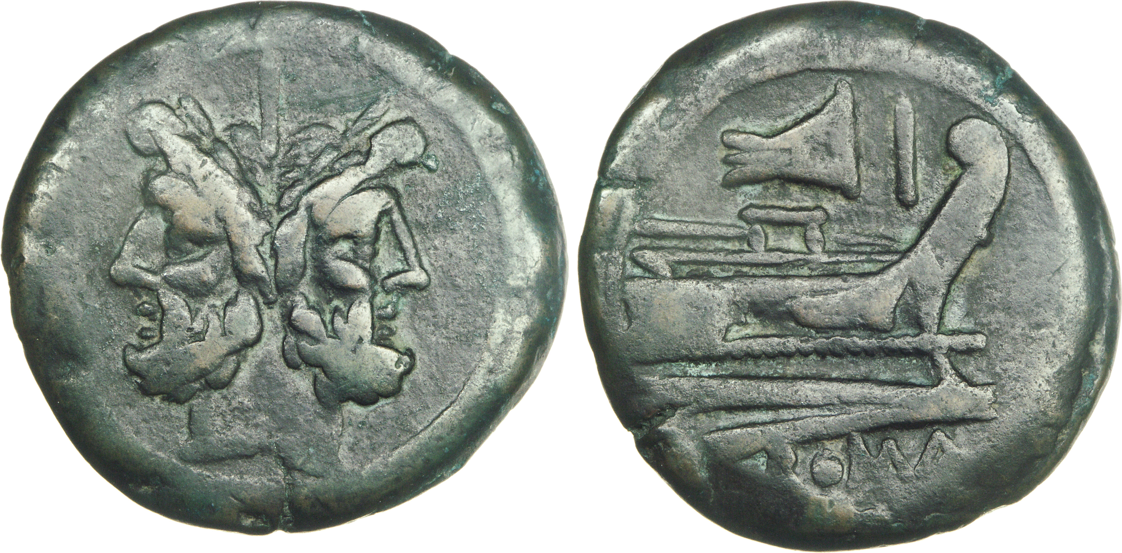 Nom de l'atelier : Rome Métal : bronze Diamètre : 32mm Axe des coins : 9h. Poids : 28,44g. Titulature avers : Anépigraphe. Description avers : Tête barbue de Janus , au-dessus, I. Titulature revers : ROMA. Description revers : Proue de galère à droite (rostre) ; au-dessus, éperon de galère ; devant, I. Traduction revers : “Roma”, (Rome).